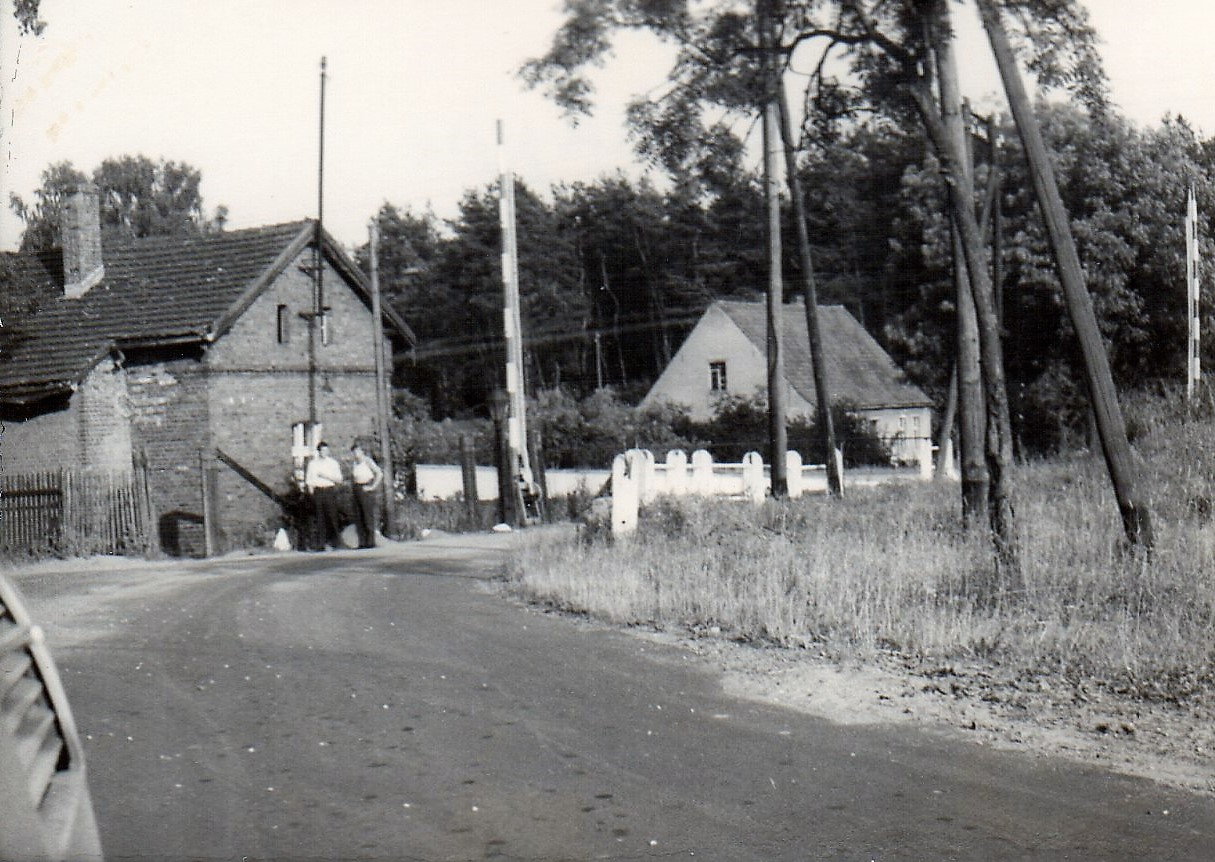 Bahnhof Stobno (Stöwen) (1971)